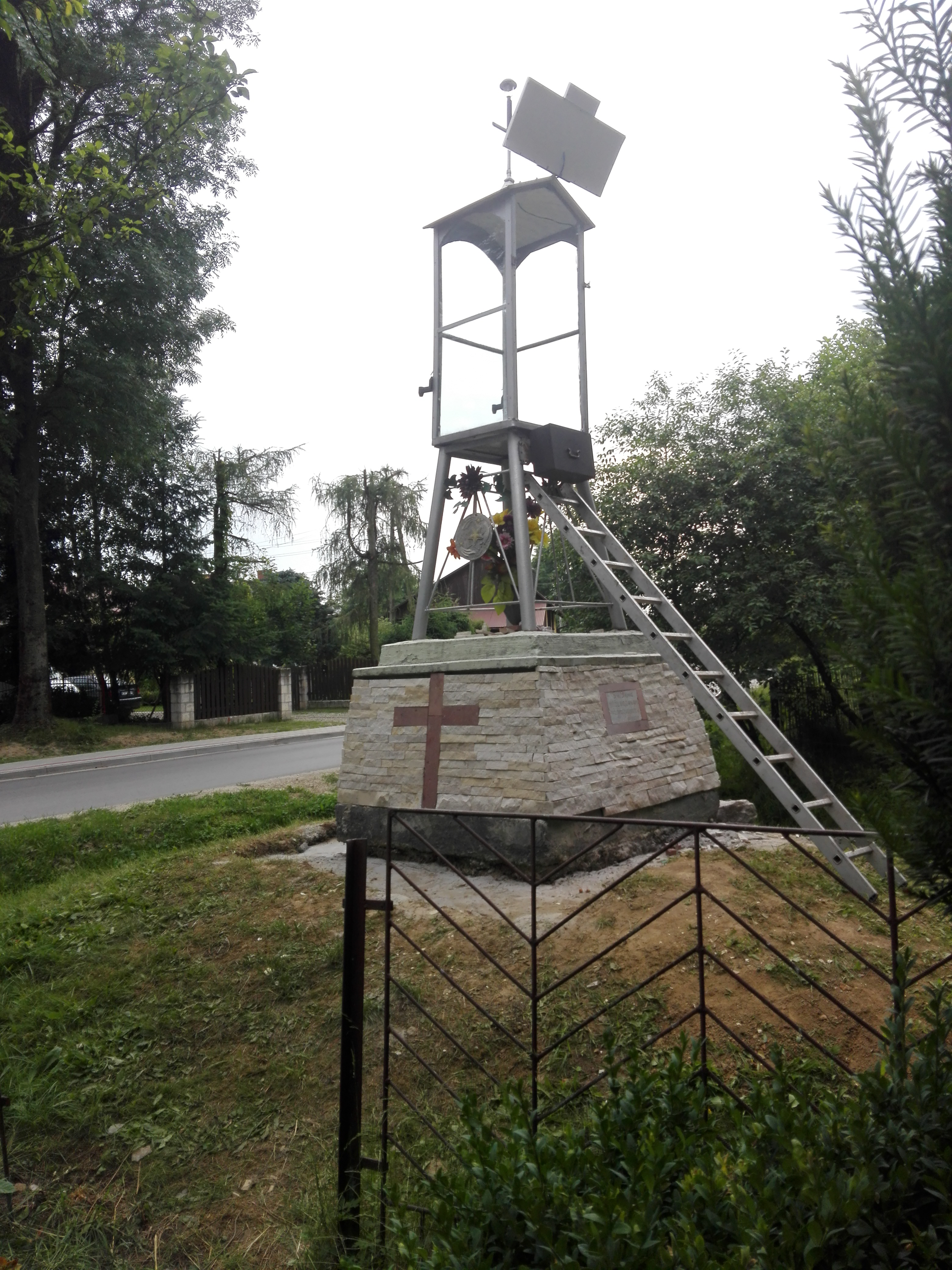 remont kapliczki w czerwcu 2017